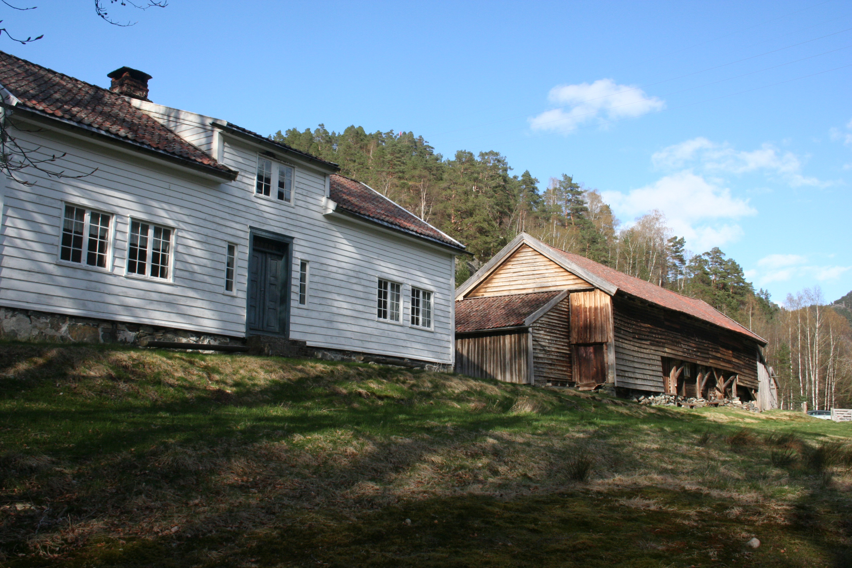 Kolbeinstveit (Norway)